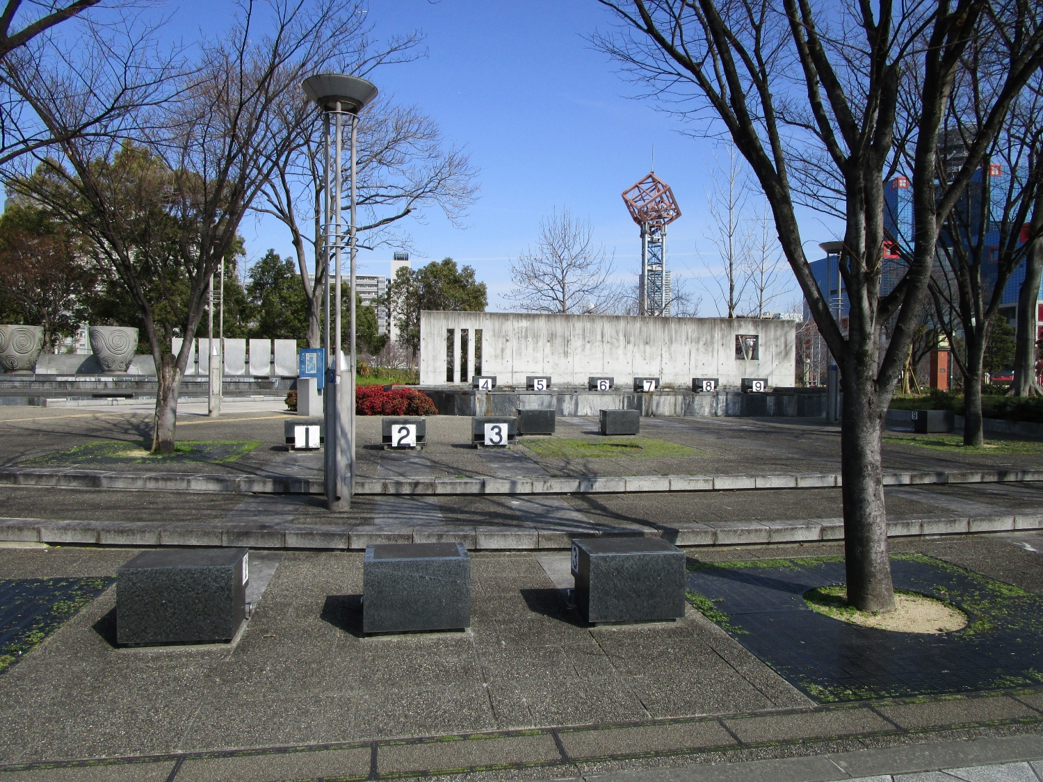 旧大阪プールのスタート台のモニュメント